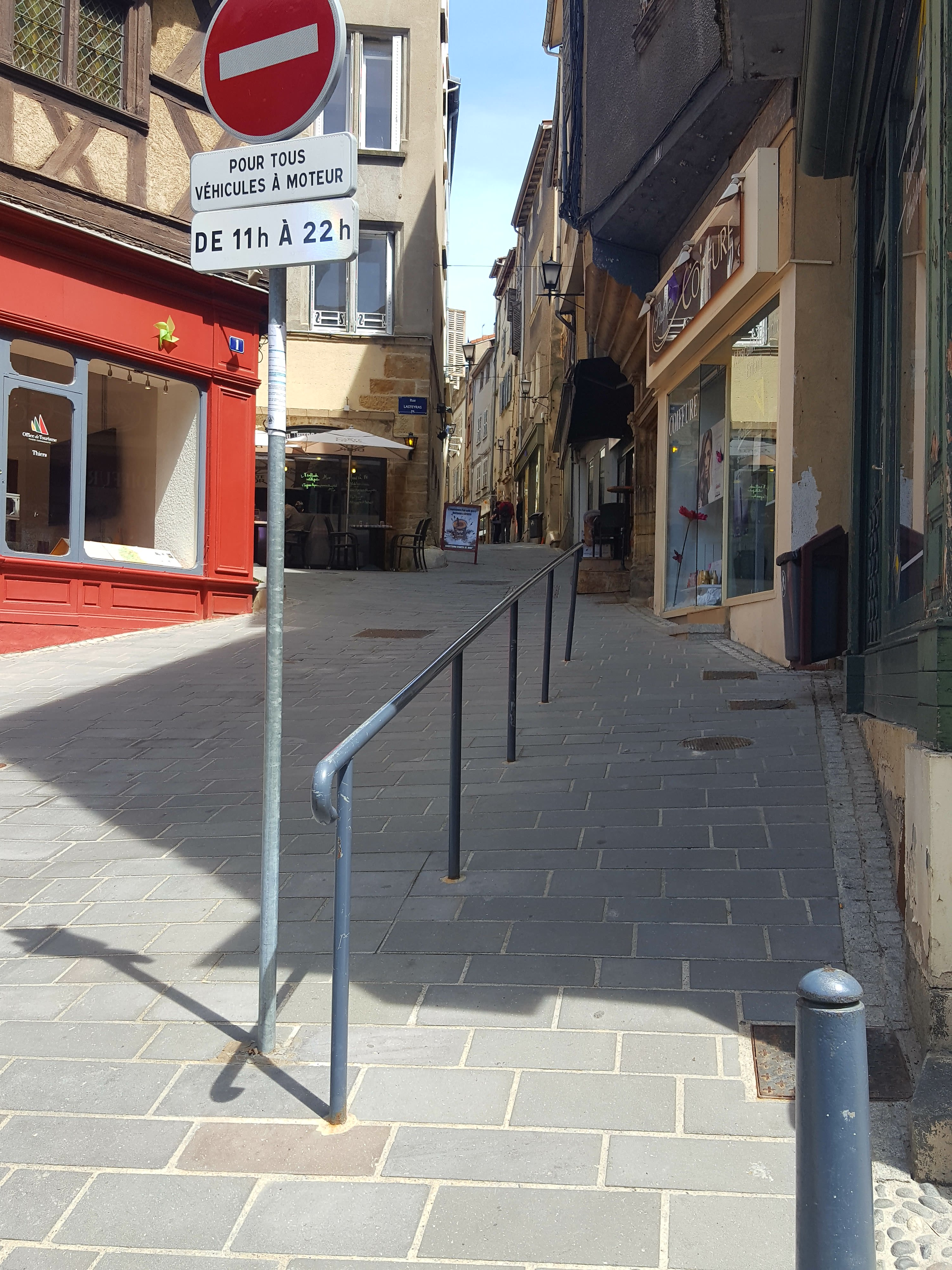 Rue du bourg à Thiers63